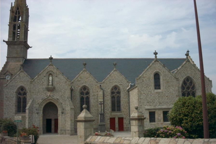 Eglise de Landudec